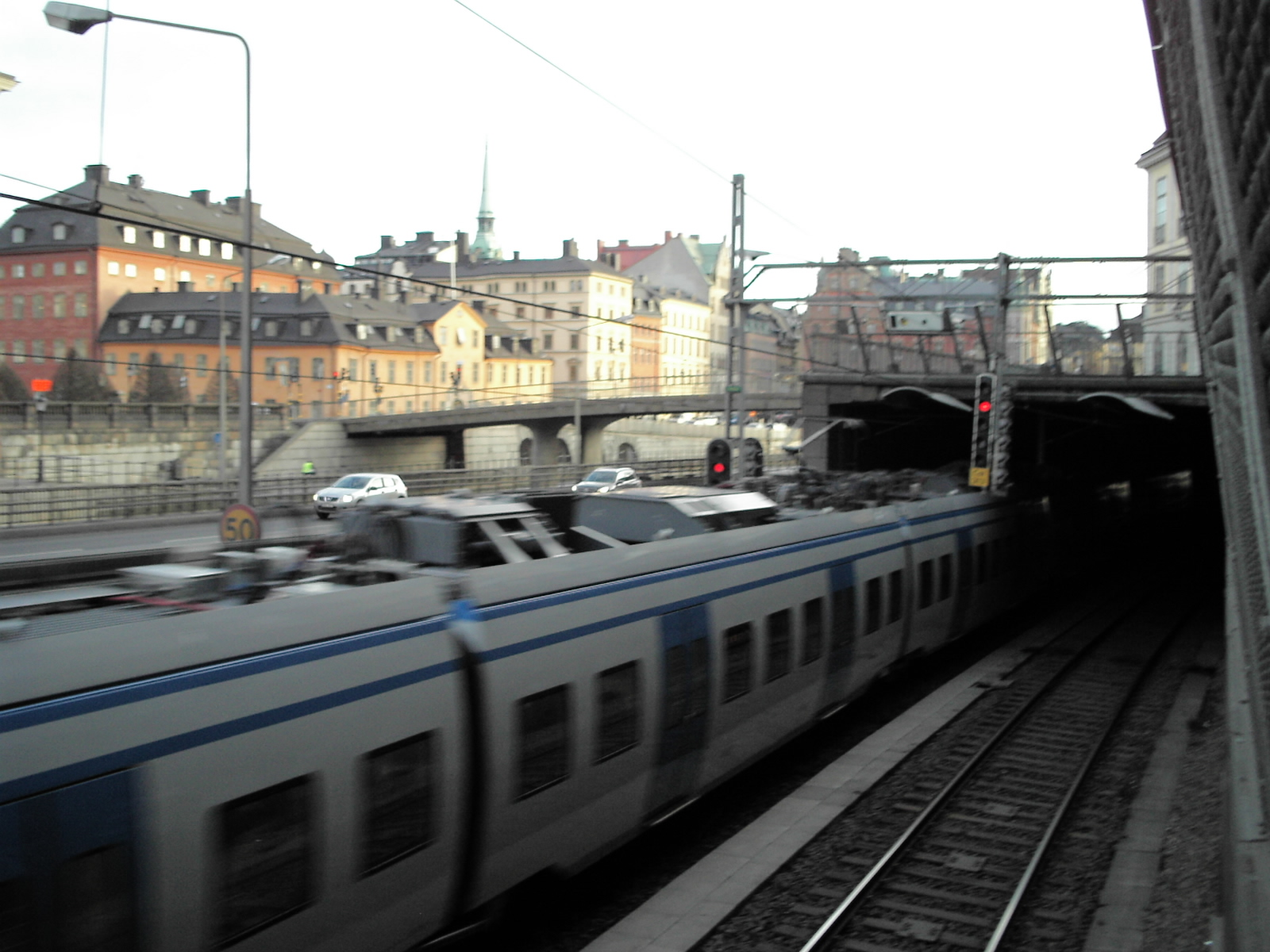 Detektor för att upptäcka fel i strömavtagarens kolskena